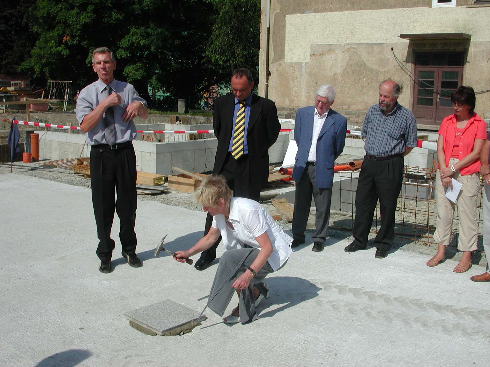 Grundsteinlegung des Neubaus des Johann-Heinrich-Pestalozzi-Gymnasiums Rodewisch mit ehemaliger Schulleiterin Frau Hein